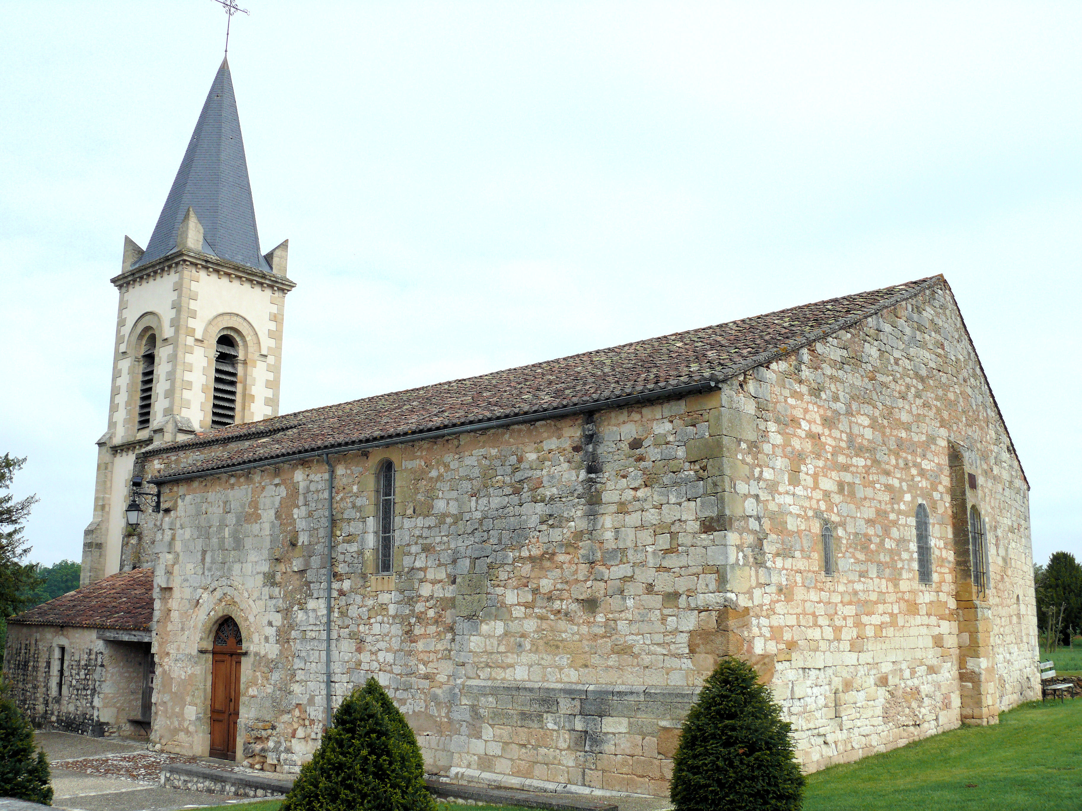 Capdrot - Eglise Notre-Dame-de-l'Assomption